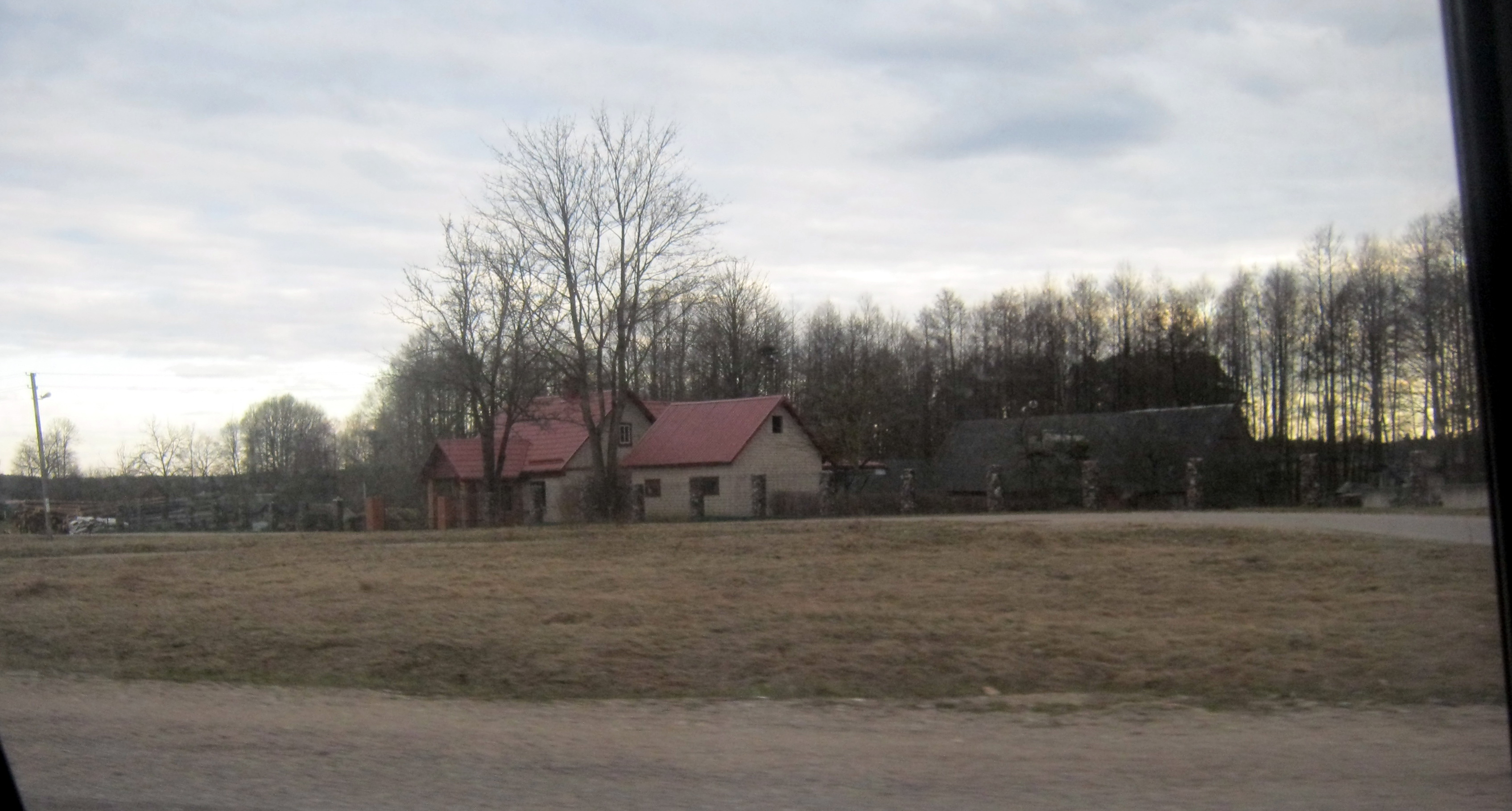 Upninkėliai